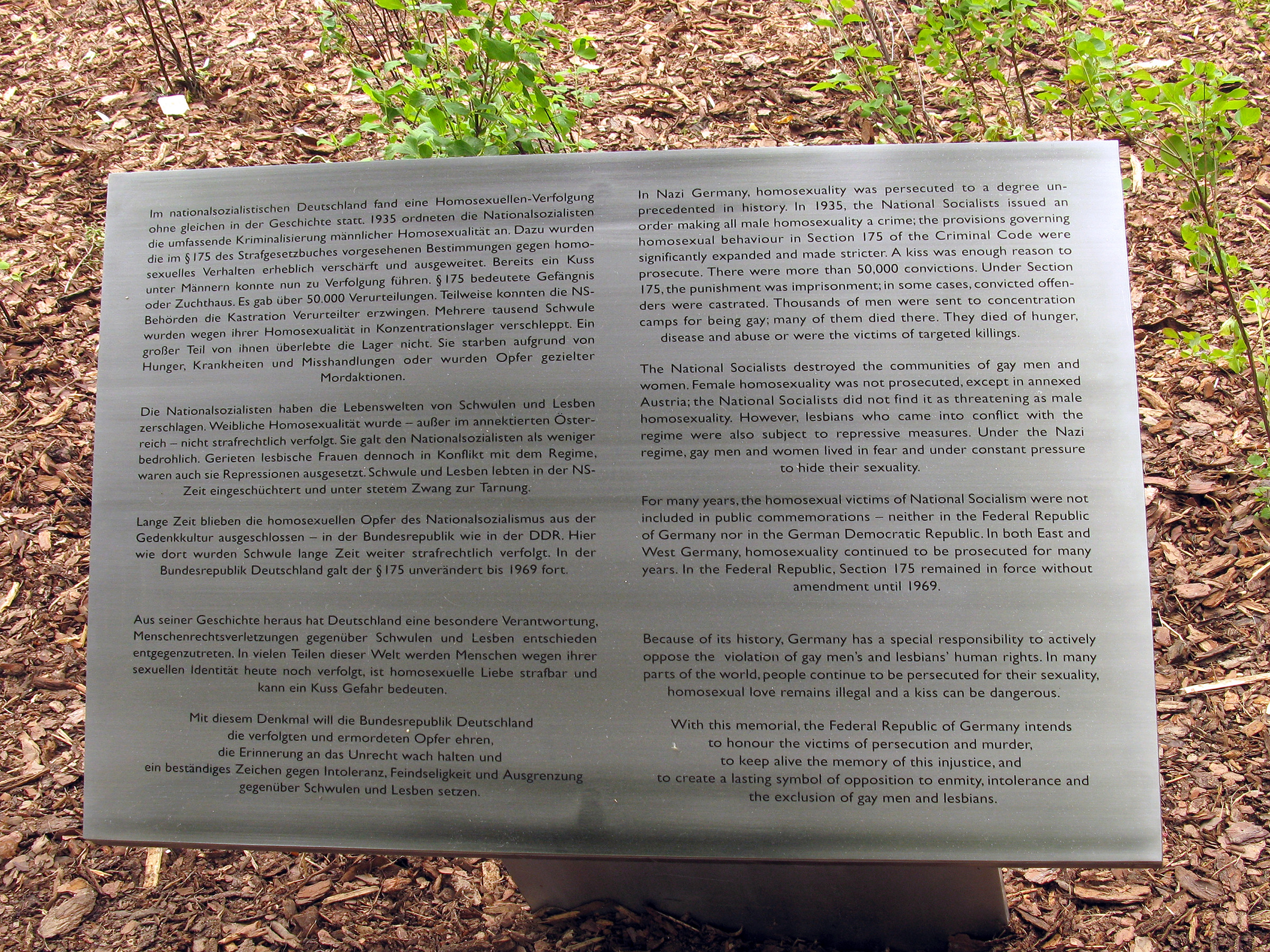 Gedenktafel am Denkmal für die im Nationalsozialismus verfolgten Homosexuellen, 27. Mai 2008, Berlin-Tiergarten